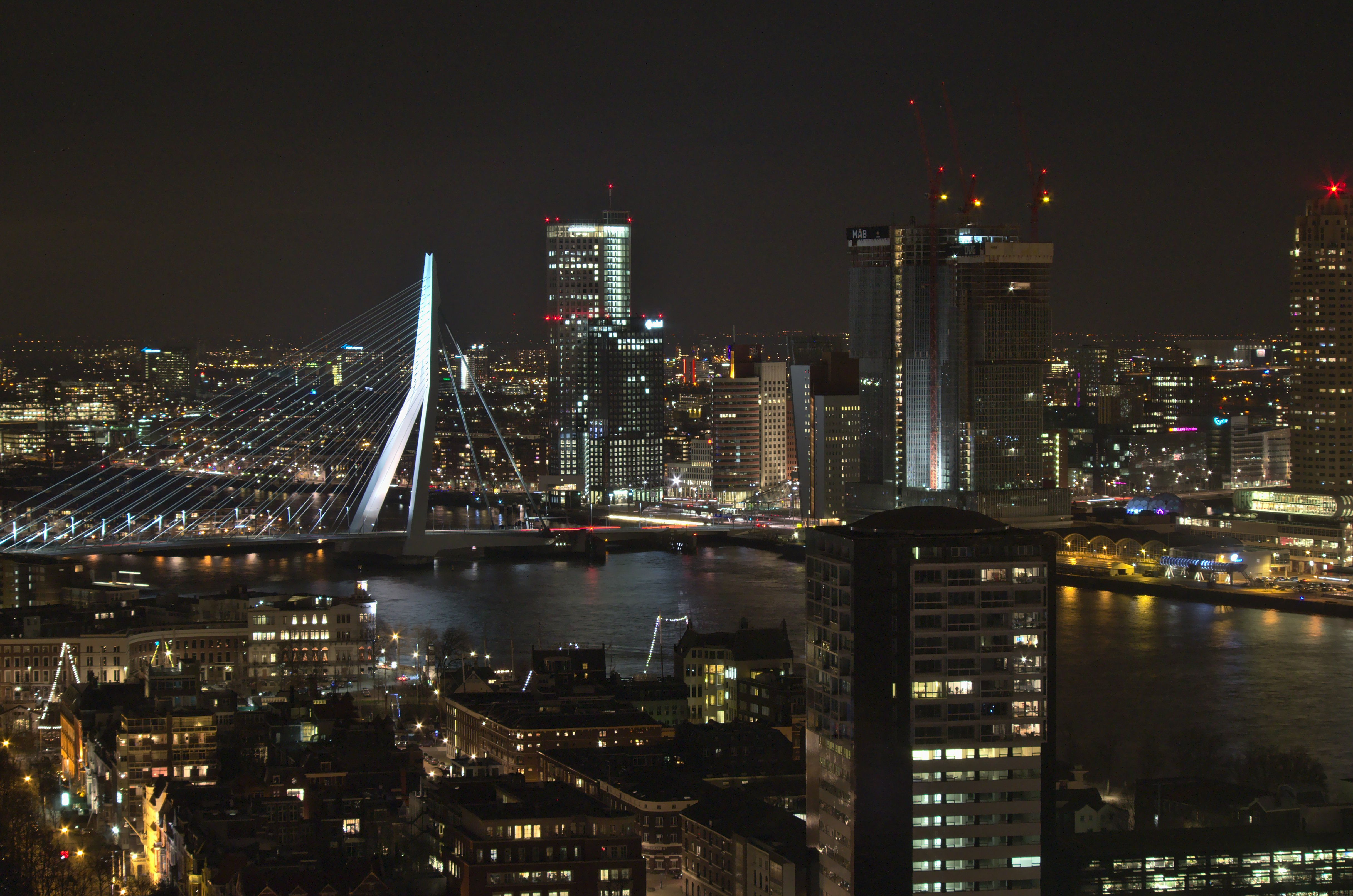 Erasmus